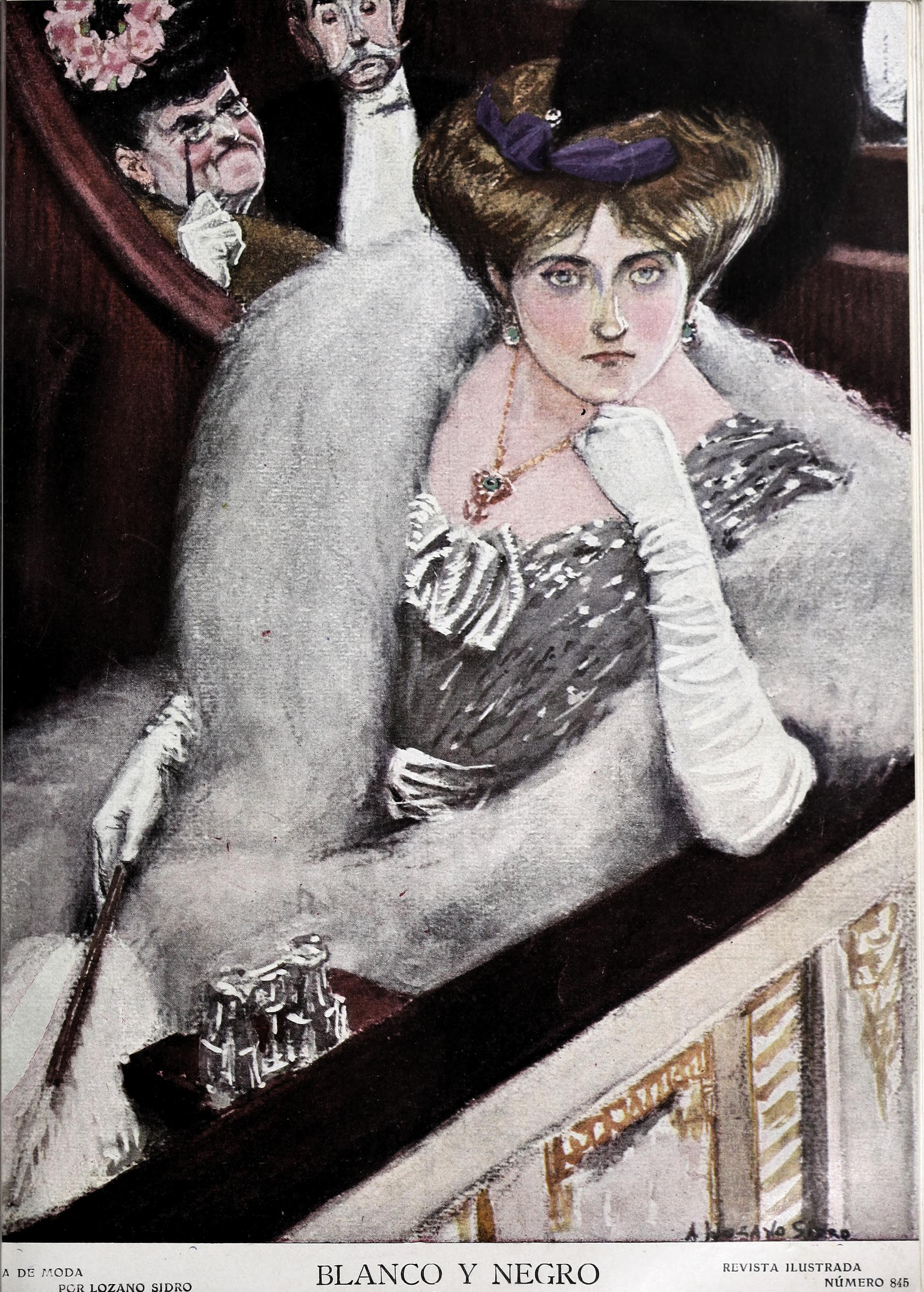 Blanco y Negro, 13 de julio de 1907.